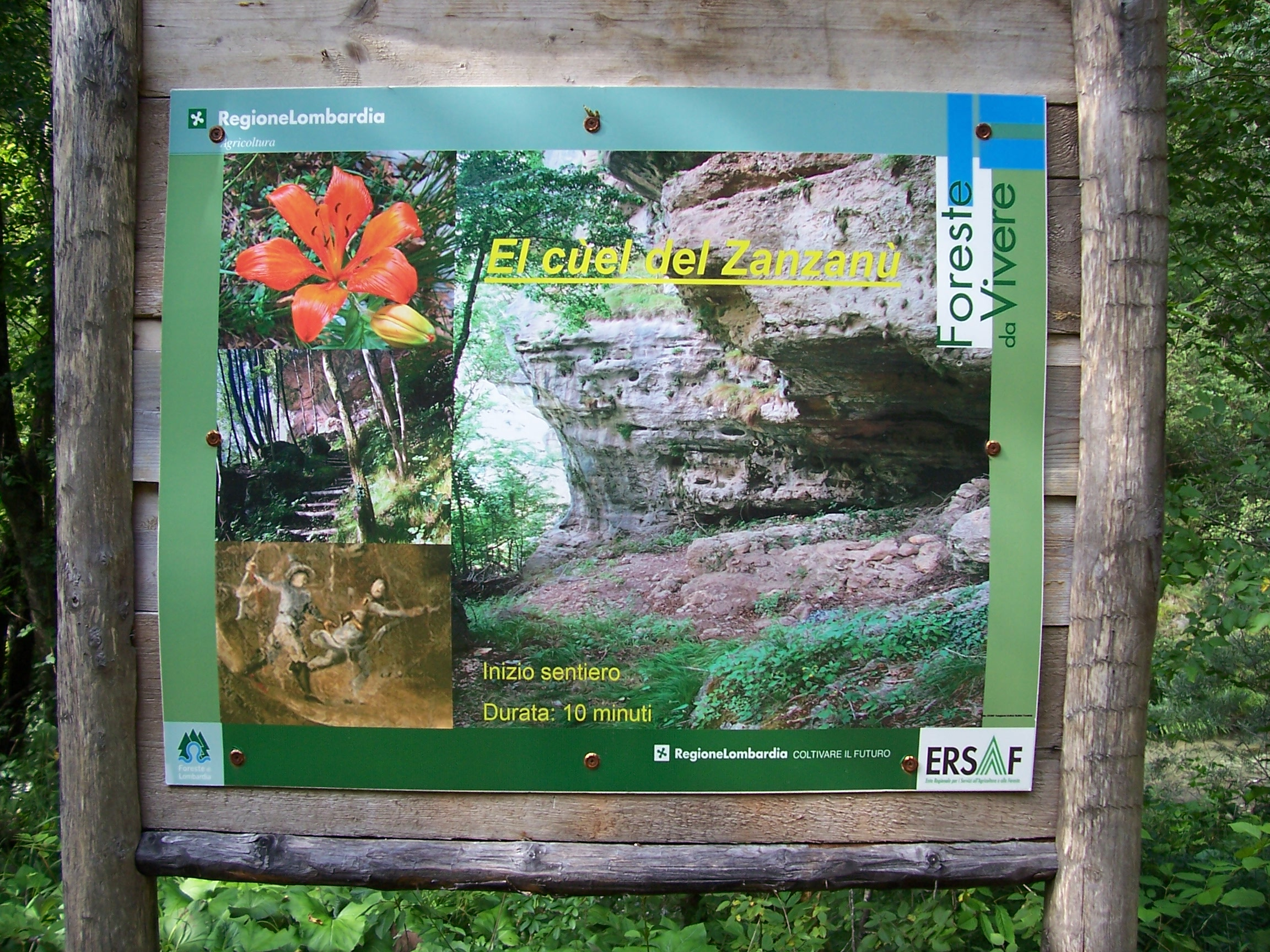 Il cartellone ERSAF che indica sentiero che porta al Cuel Zanzanù nella Vallata del Droanello in Valvestino